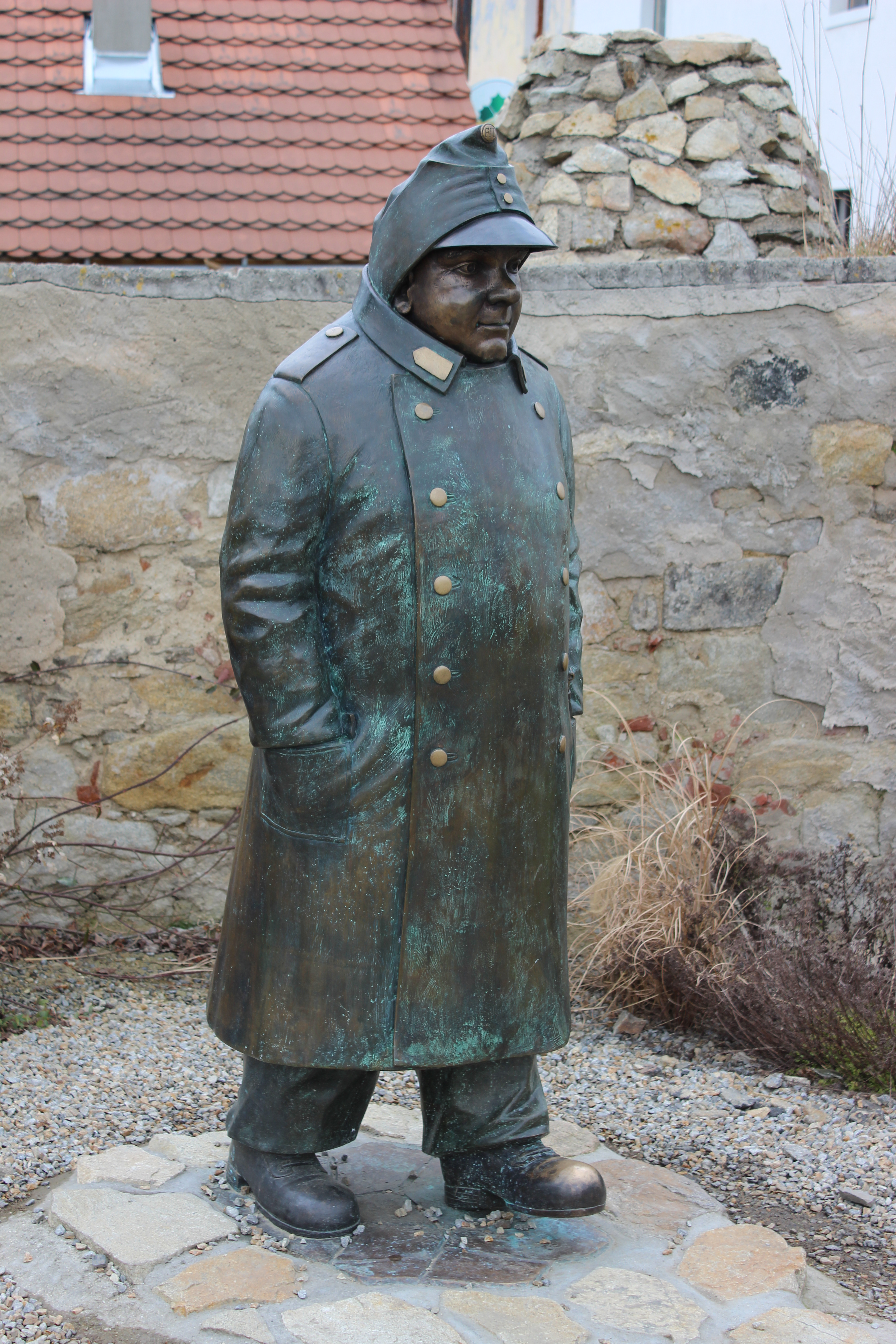 Socha Josefa Švejka. Putim. Okres Písek. Ćeská republika.